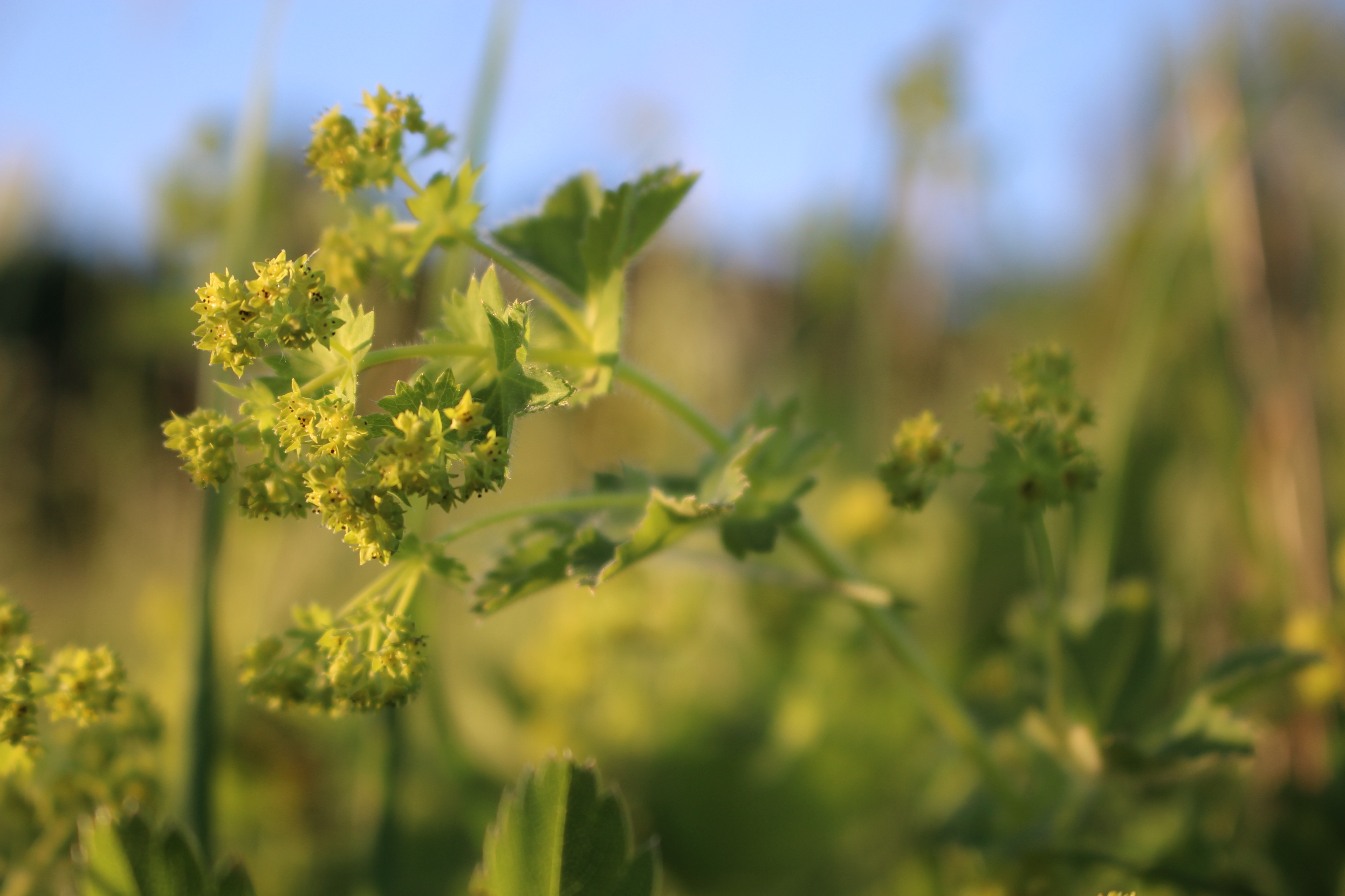 Kortslehe õisik